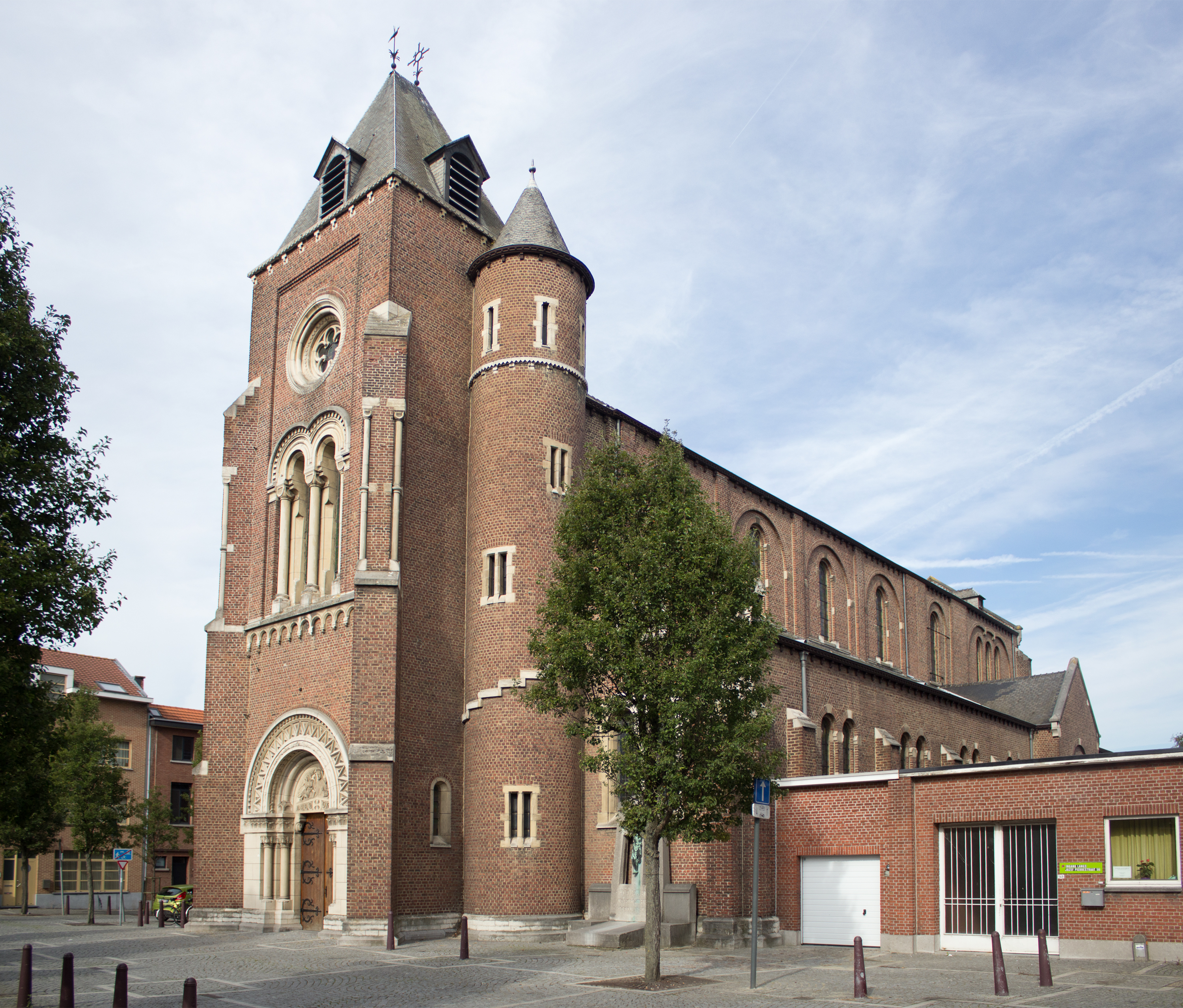 Parochiekerk Heilig Hart, Kessel-Lo